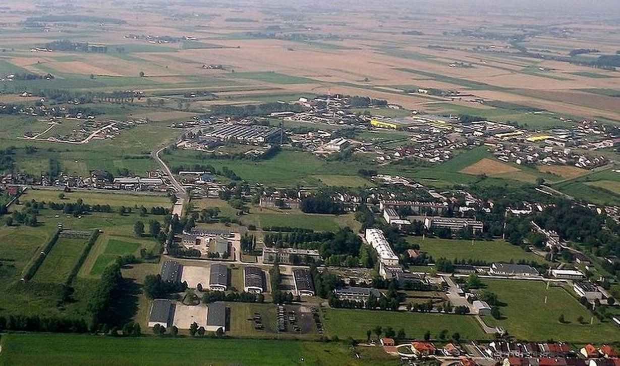 Współczesny widok z lotu ptaka na koszary garnizonu Przasnysz